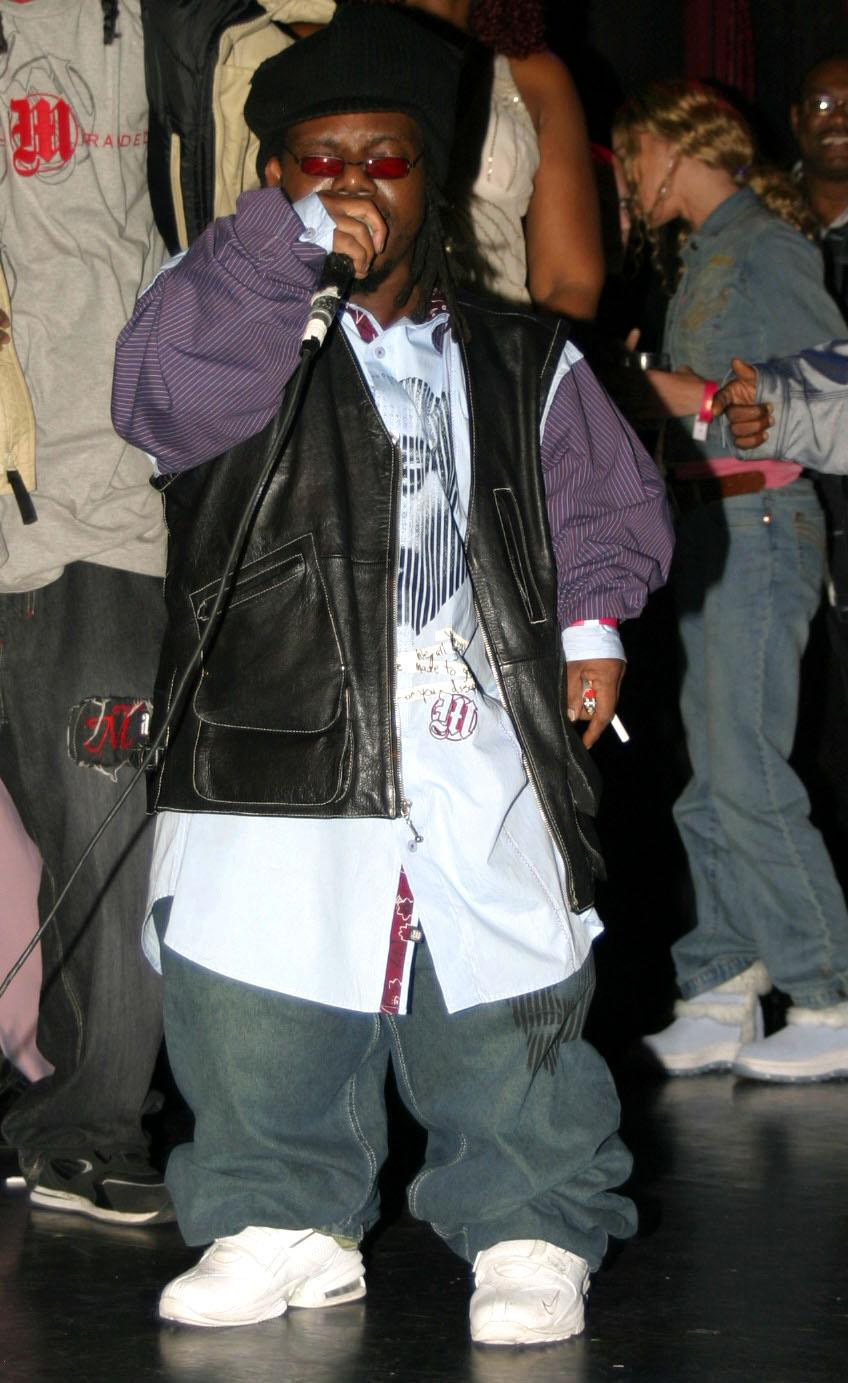 Rapper Bushwick Bill